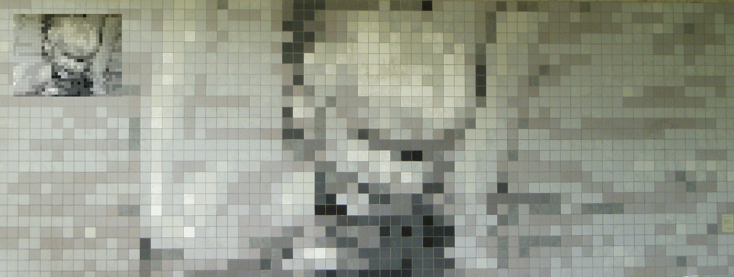 "Grått i grått" konstverk av Maria Ängquist-Klyvare i Grynkvarnsparken, Johanneshov. En förminskning av konstverket är infälld i övre vänstre hörn (fotomomtage av fotografiets upphovsman)